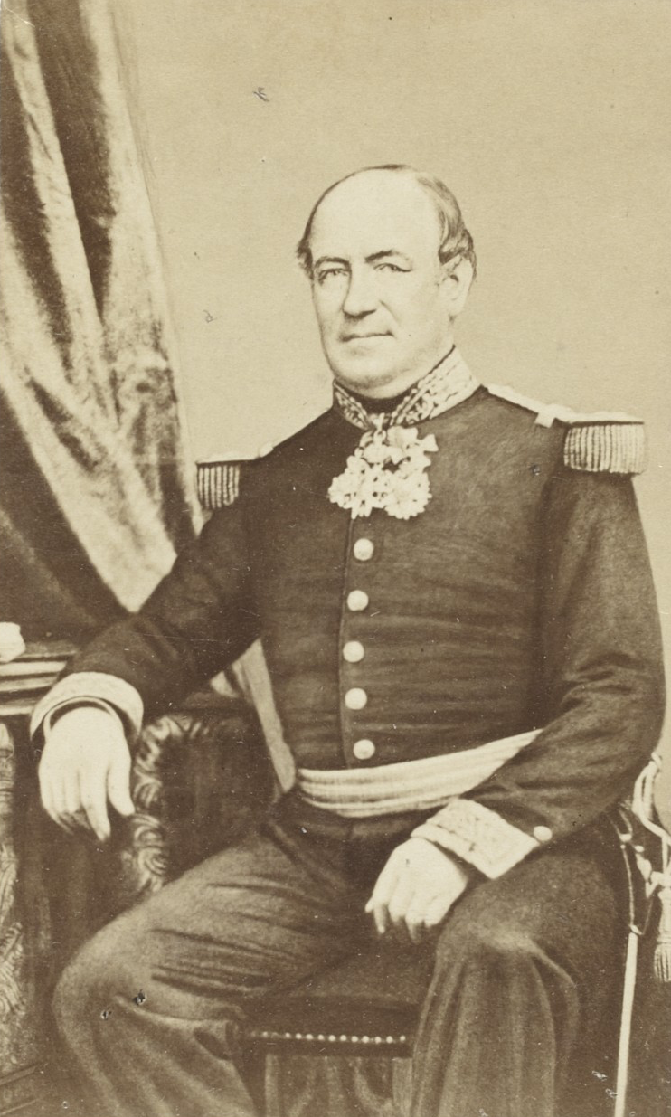 Photographie de Louis Tardy de Montravel - 1811 - 1864